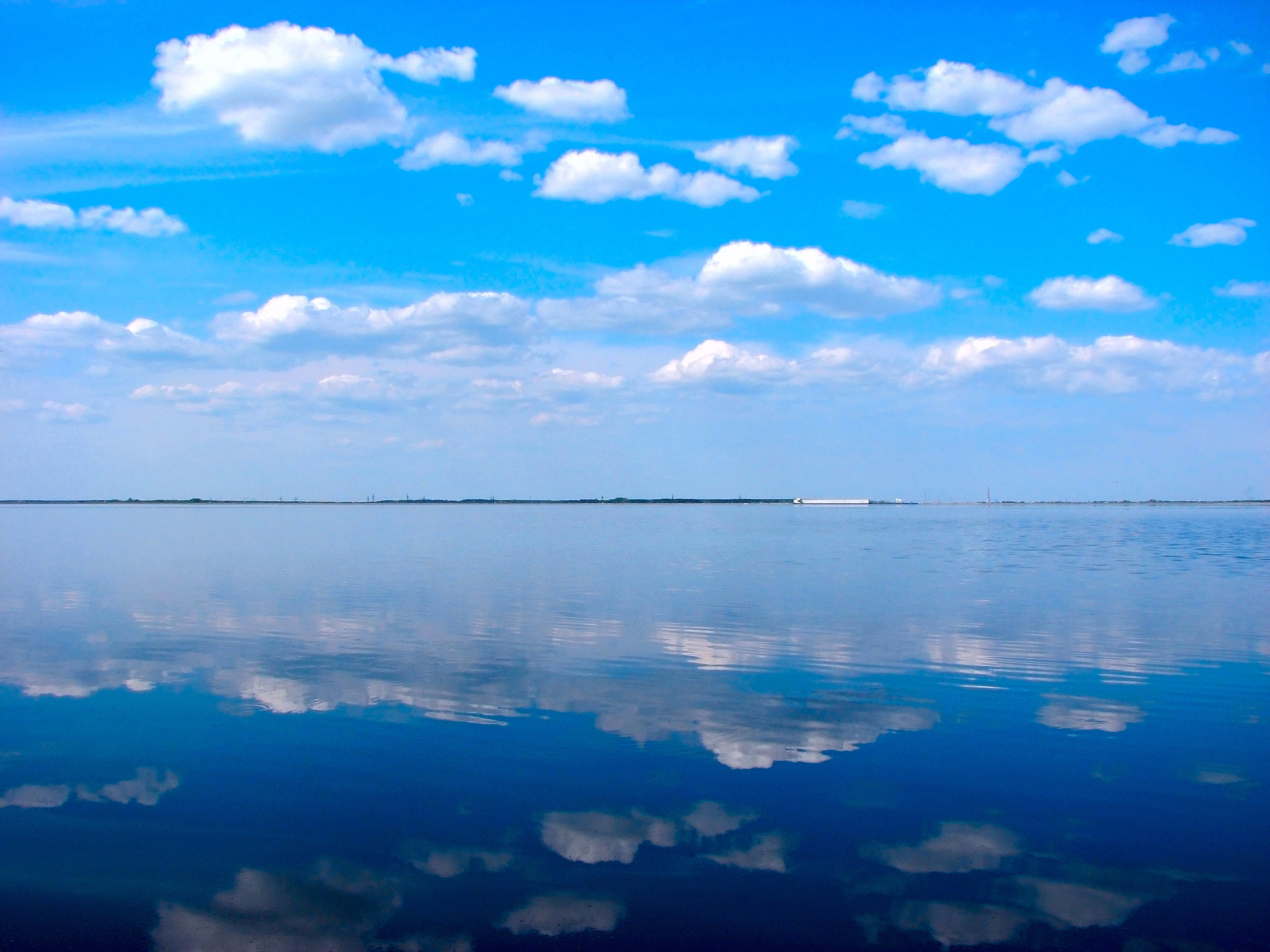 хороший летний день